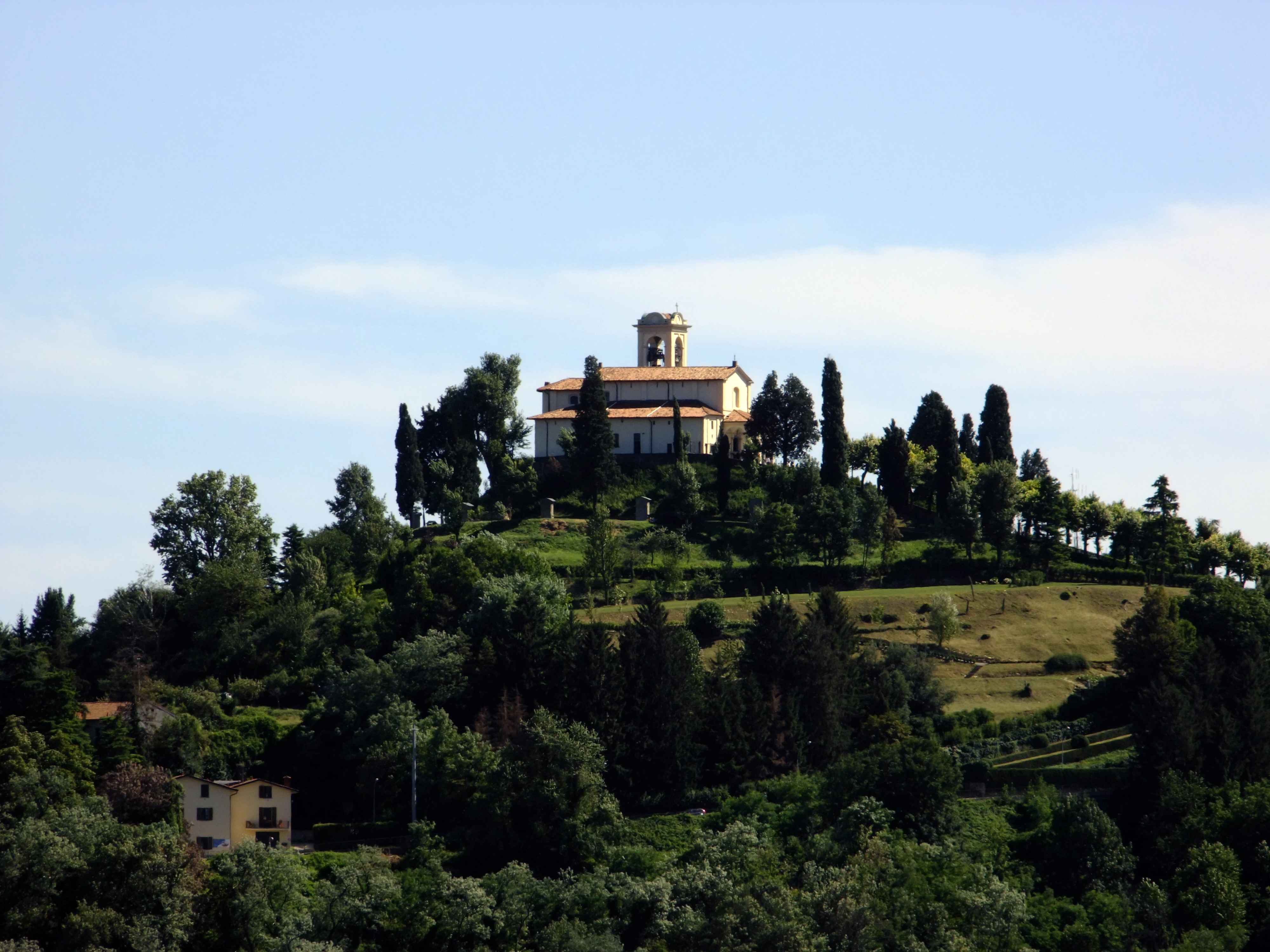 la chiesa di Montevecchia